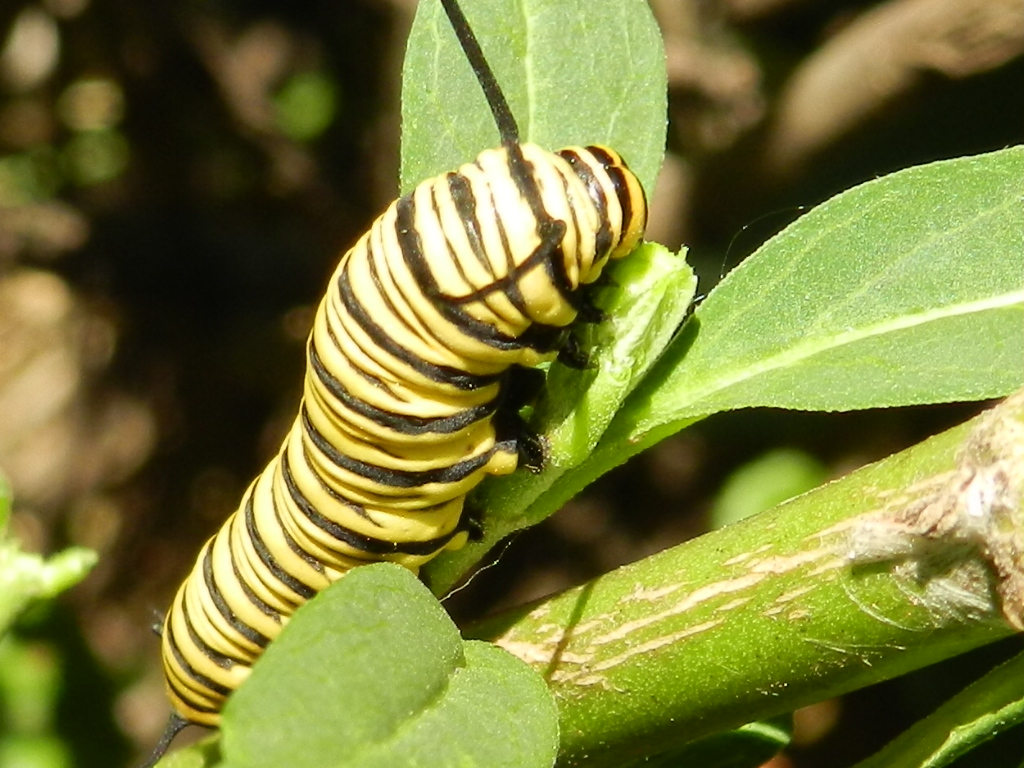 Larva de mariposa monarca (Danaus erippus) en hoja de Asclepias